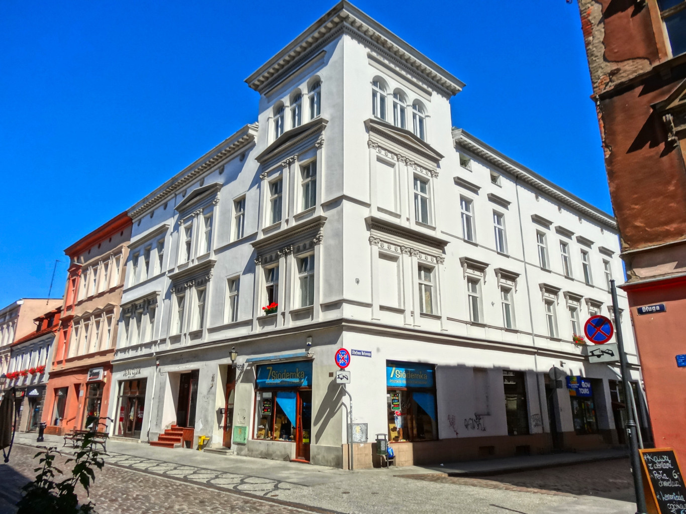 Kamienica przy ul. Długiej 31 w Bydgoszczy - róg ul. Stefana Batorego